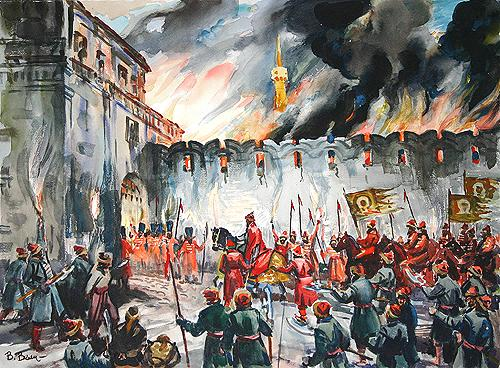 Rusların Qazan xanlığını işğalı (1552-ci il)